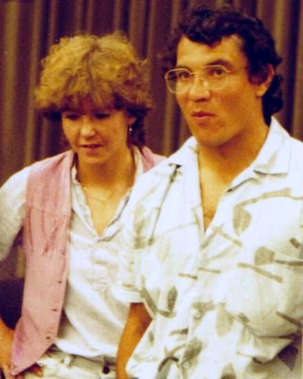 Isabel Hund und Felix Magath 1985 in Hamburg anläßlich einer Veranstaltung des Nachrichtenmagazins Der Spiegel